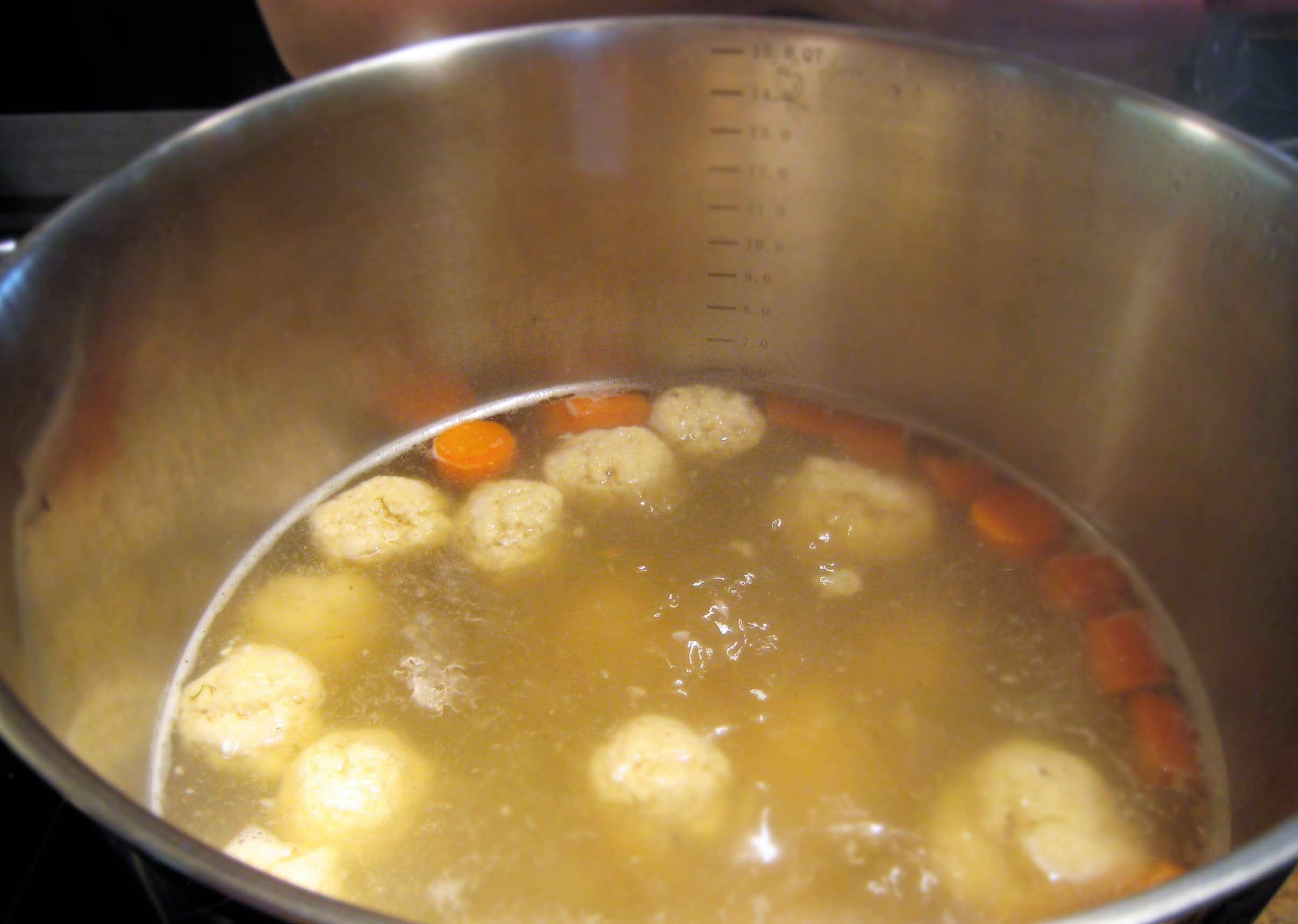 Simmern von Suppeneinlage (u. a. kleine Matzeknödel und Karottenscheiben) in Brühe, bei der Zubereitung einer Matzeknödel-Suppe.